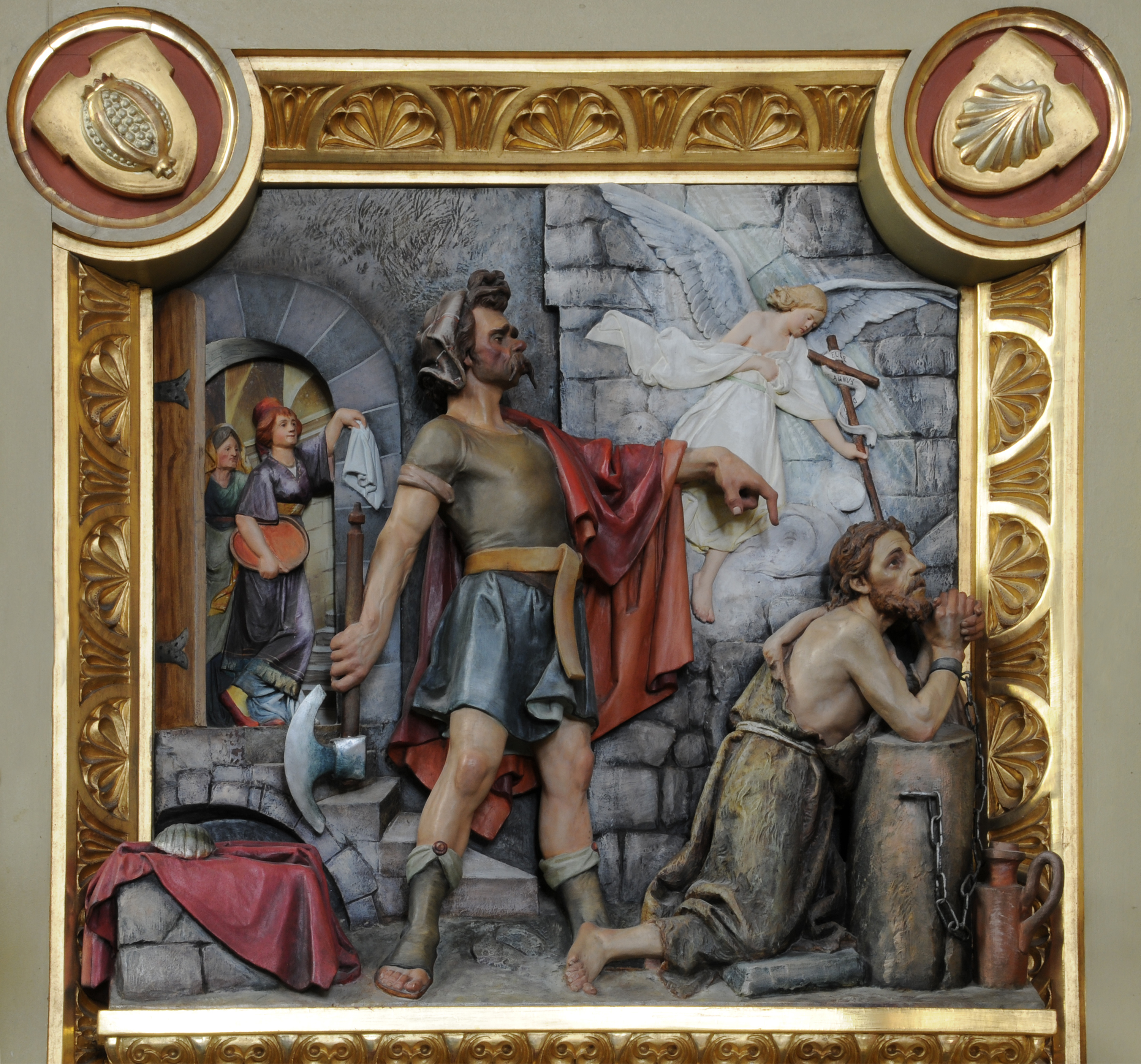 From the parish church of St. Ulrich in Gröden - Ortisei Val Gardena - Sculptor Albino Pitscheider 1905